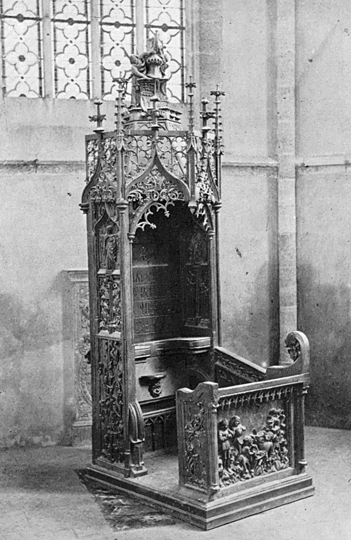 Urach, Amandus Kirche, Betstuhl des Grafen Eberhard im Bart, Sammlung Schwäbischer Baudenkmaleund Kunstarbeiten, 8, 244*165mm